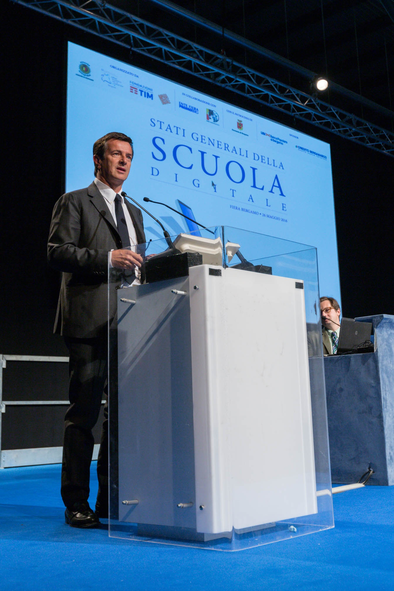 Bergamo organizza gli Stati Generali della scuola digitale, confronto nazionale sul futuro digitale della didattica e dell'istruzione italiana.